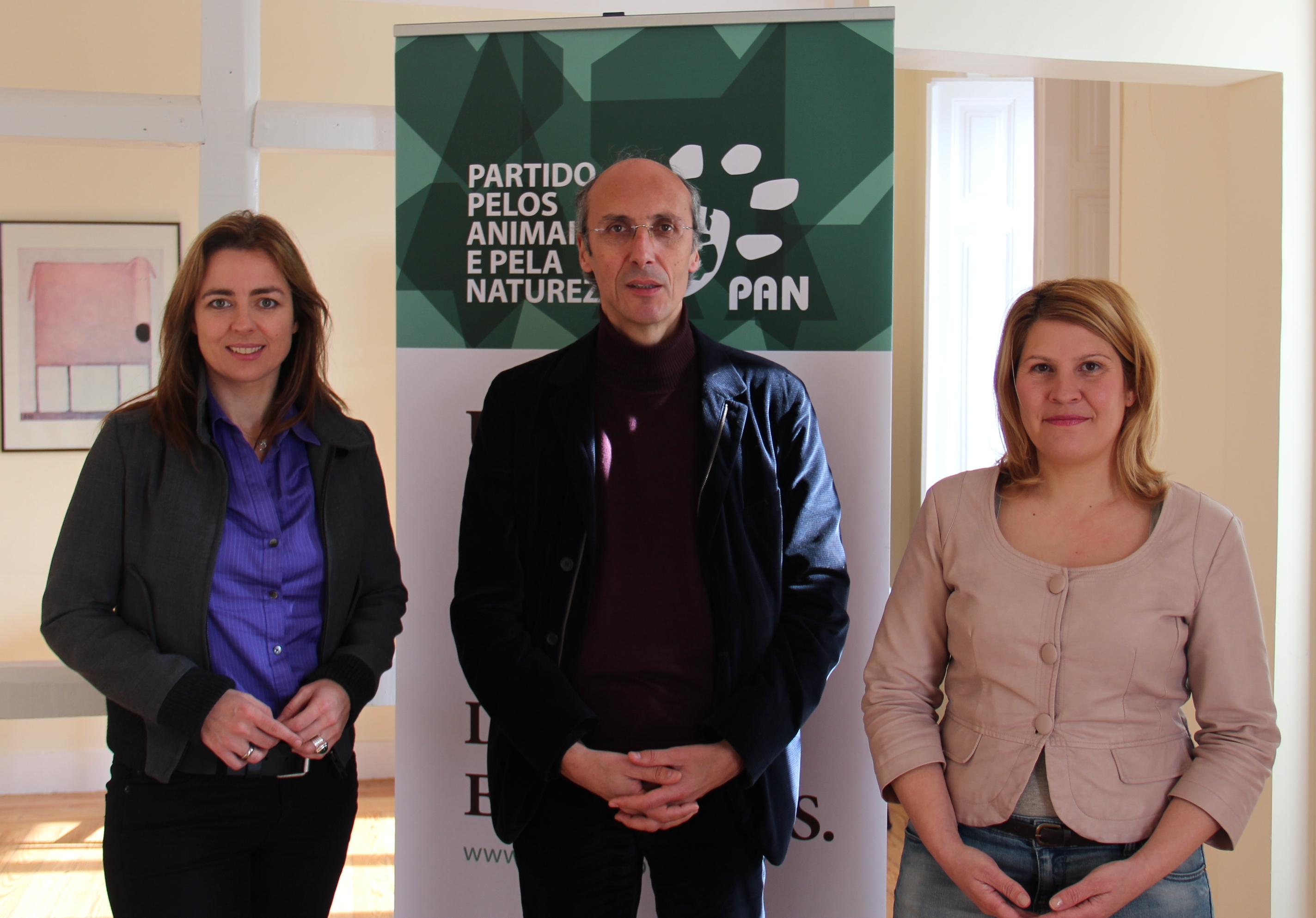 Encuentro entre los partidos animalistas portugués (PAN), holandés (PvdD) y español (PACMA) celebrado en Lisboa el 8 de enero de 2014, con la asistencia de Paulo Borges, Marianne Thieme y Silvia Barquero respectivamente.